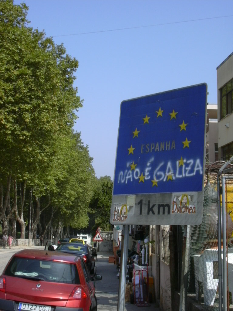 Fronteira entre Espanha e Portugal (Tui e Valença do Minho)